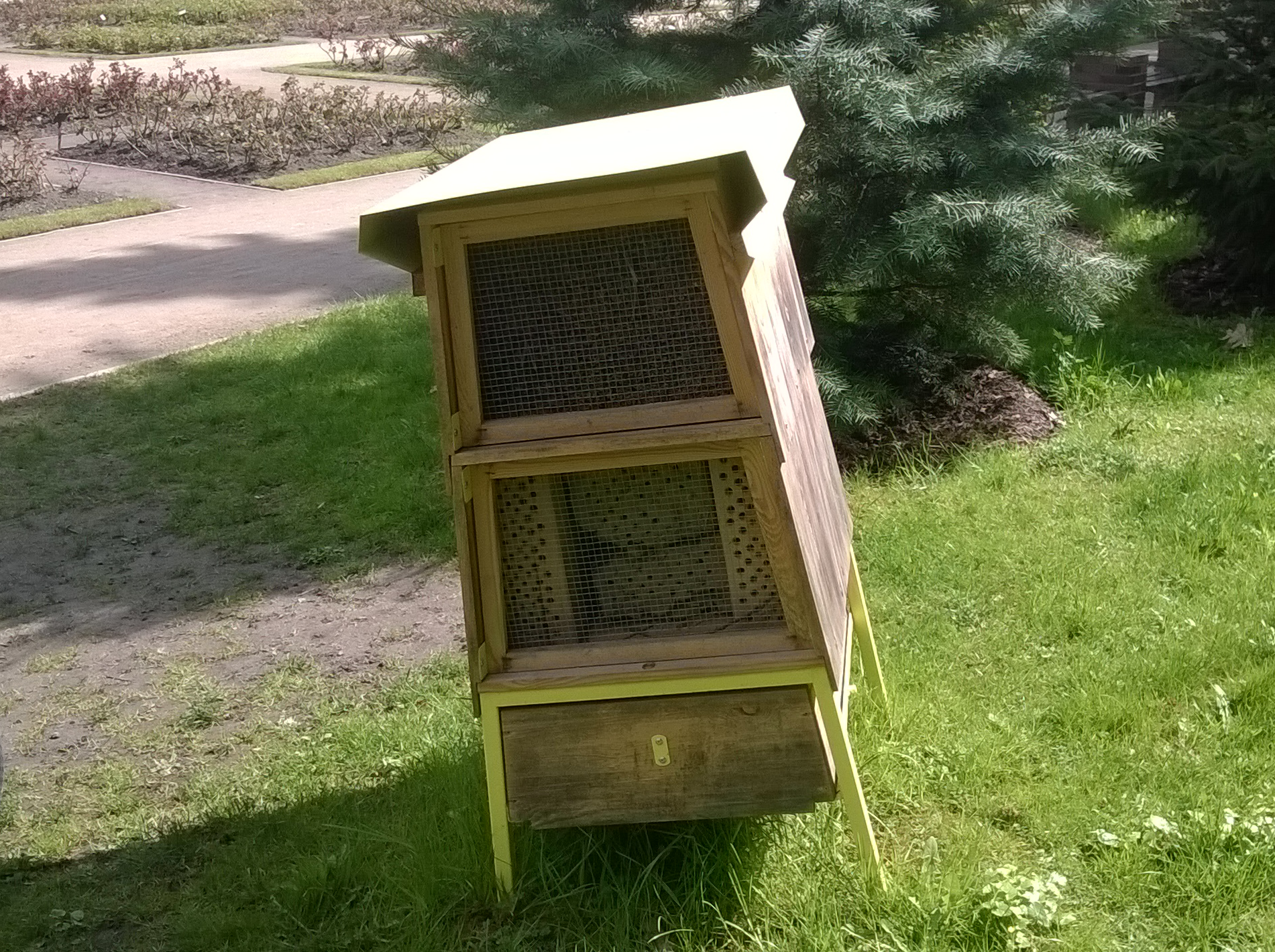 Hotel dla pszczół, ustawiony w Ogrodzie Różanym w Szczecinie (kwiecień 2015)